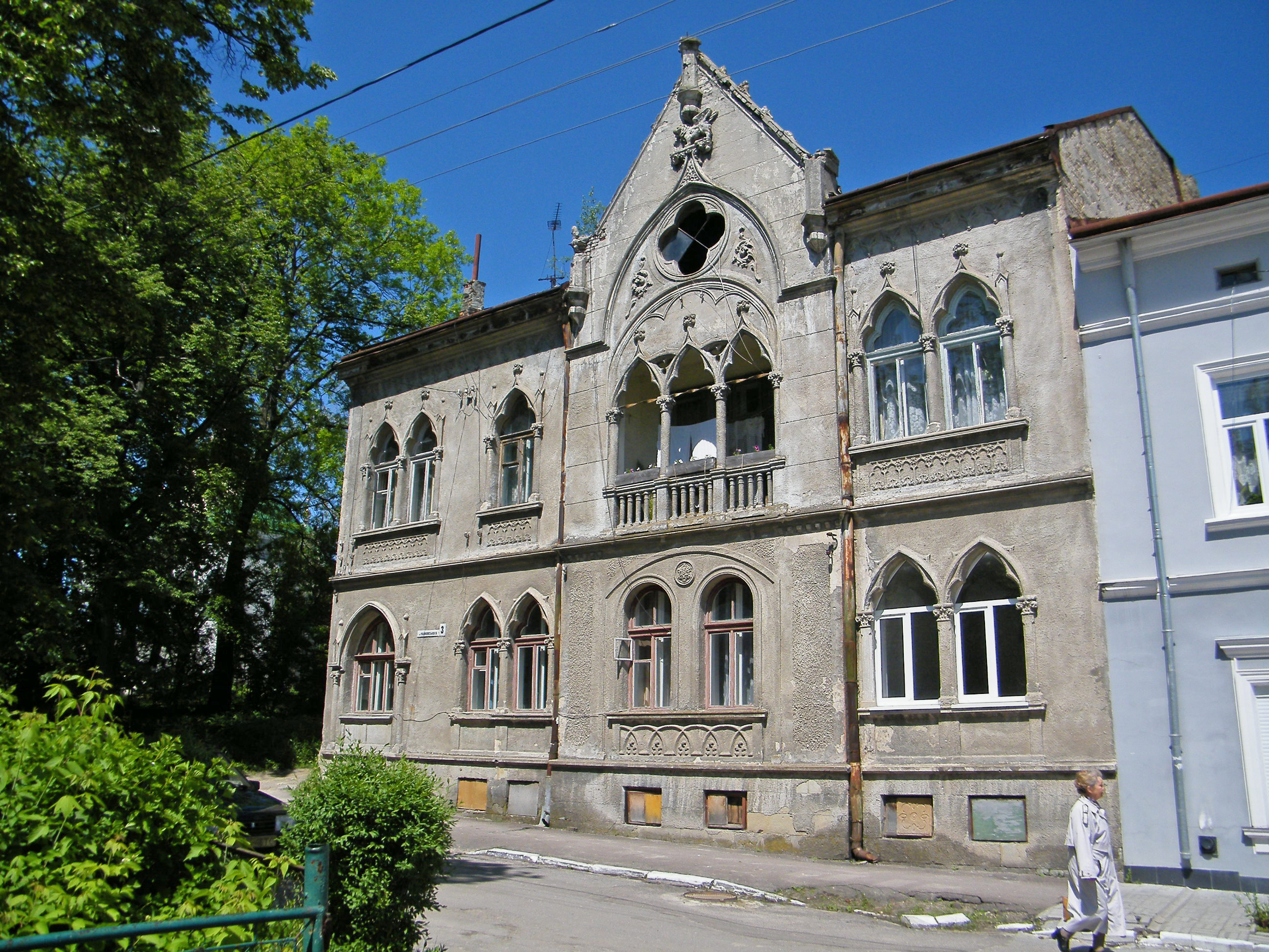 Старый дом